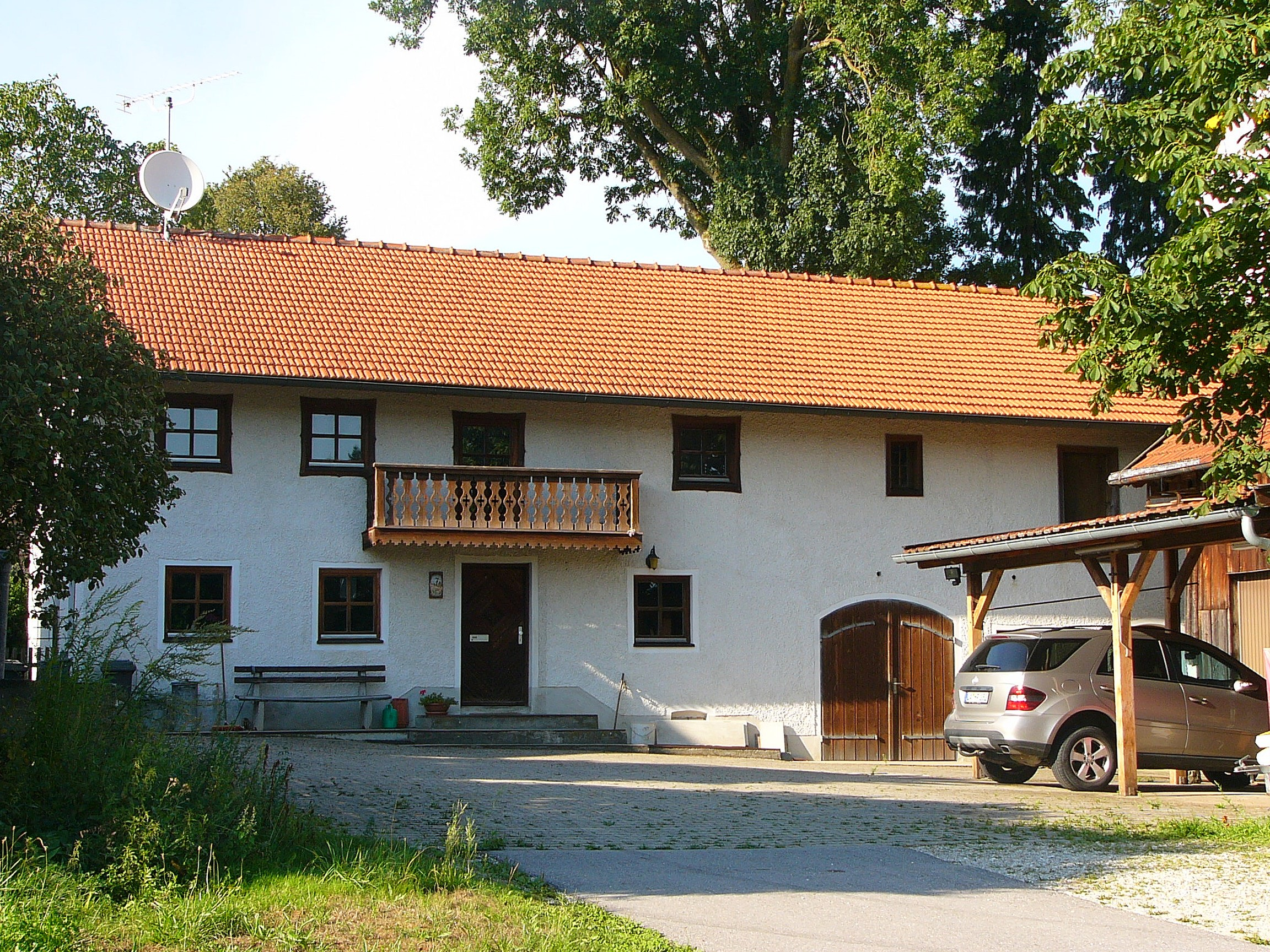 Wohnstallhaus eines ehemaligen Dreiseithofs; zweigeschossiger Flachsatteldachbau mit Obergeschoss in Blockbau, Ende 18./Anfang 19. Jahrhundert. This is a photograph of an architectural monument.